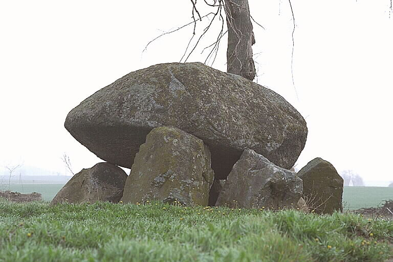 Dös vid Stendala gård. Motiv: Järrestad Kategori: Stenkammargrav Dös vid Stendala gård.